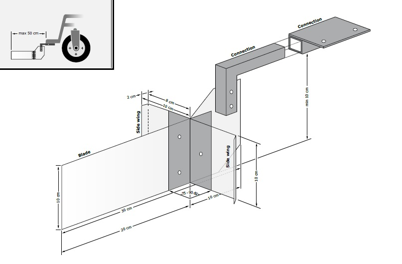 Stick regolamentare di Wheelchair Hockey